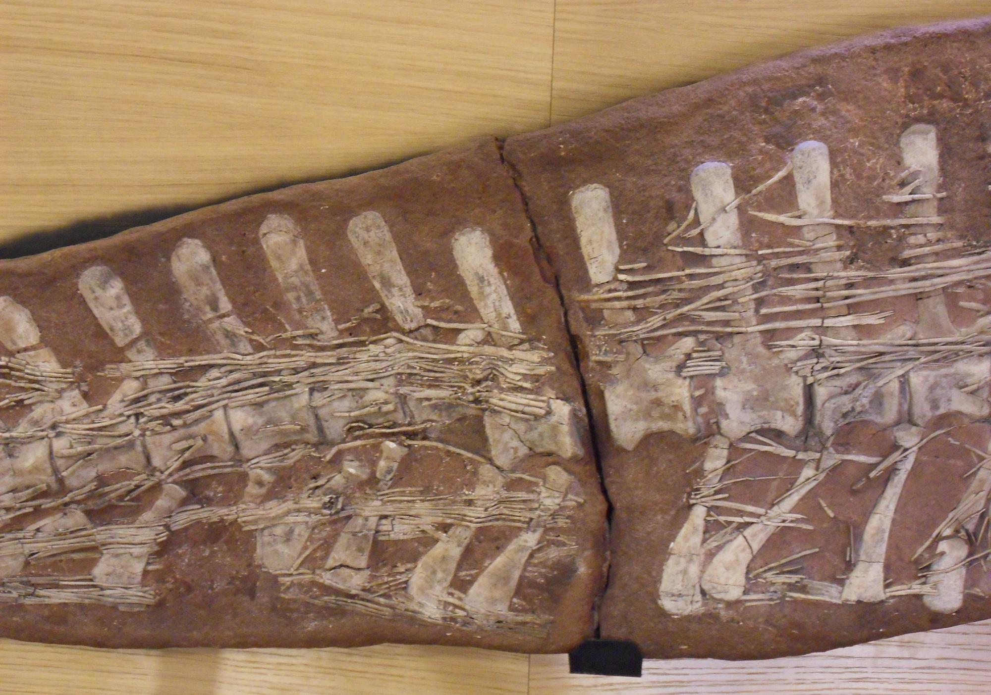 Queue d'un fossile de Tenontosaurus montrant l'organisation des tendons ossifiés.